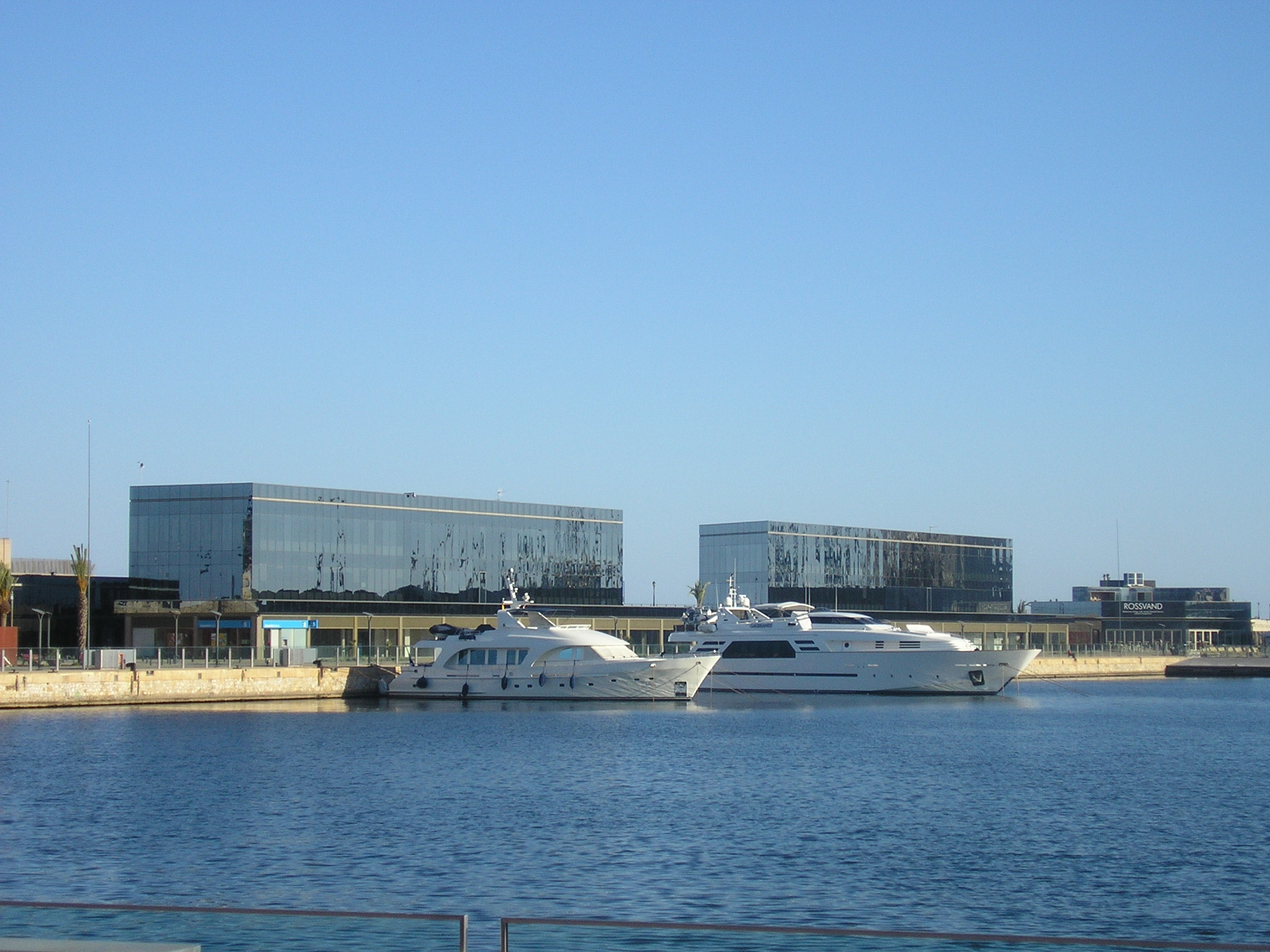 Port de Tarragona i platja del miracle.